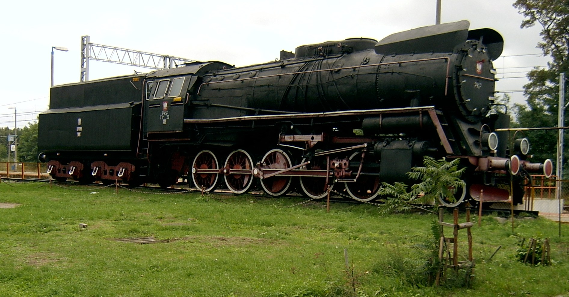 Denkmallokomotive der PKP-Baureihe Ty51 am Bahnhof in Rzepin (Polen)